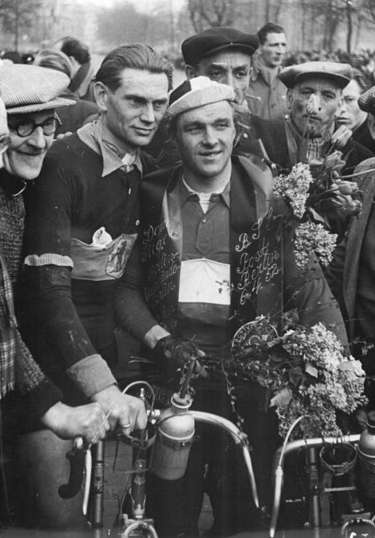 Erich Schulz, Rudi Kirchhoff Zentralbild Junge 6.4.1952 Eröffnungs-Radrennen Berlin-Angermünde-Berlin Am 6.4.wurde das Eröffnungsrennen der Strassensaison 1952 Berlin-Angermünde-Berlin durchgeführt, an dem sich die Lehrgangsteilnehmer für die V. Internationale Friedensfahrt Warschau-Berlin-Prag beteiligten. UBz: vlnr: Der Zweite in der Leistungsklasse I Erich Schulz, BSG "Einheit Berliner Bär" daneben der Sieger der Leistungsklasse I, Rudi Kirchhoff, BSG "Einheit Berliner Bär". Leihweise Zentralbild